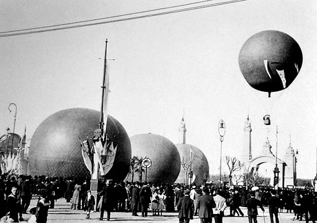 Globos aerostáticos en la Exposición de Ferrocarriles y Transportes Terrestres de la Exposición Internacional del Centenario, llevada a cabo en Buenos Aires, Argentina, en 1910.